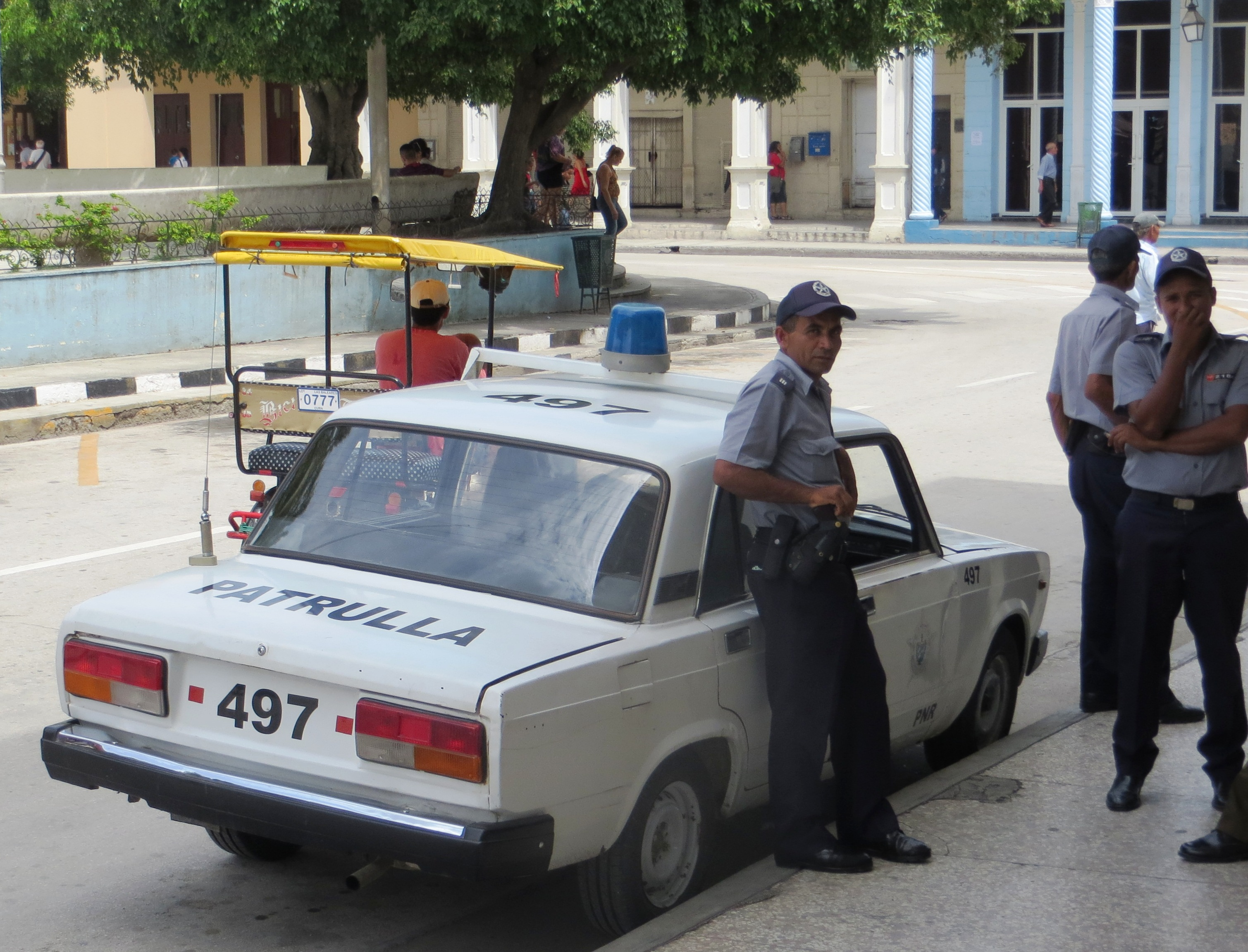 LADA 2104 Politie auto in Cuba